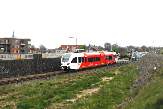 Harlingen haven, de voormalige Coupure met Arriva trein van het type Spurt op de Staatslijn B.